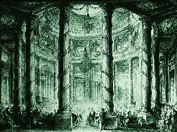 Le Colisée (Paris) - La rotonde